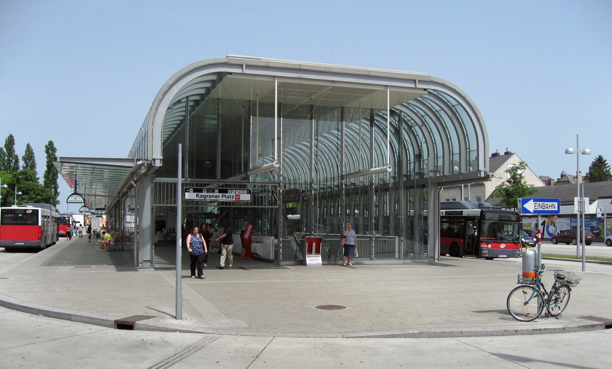 Wien U-Bahn-Station Kagraner Platz